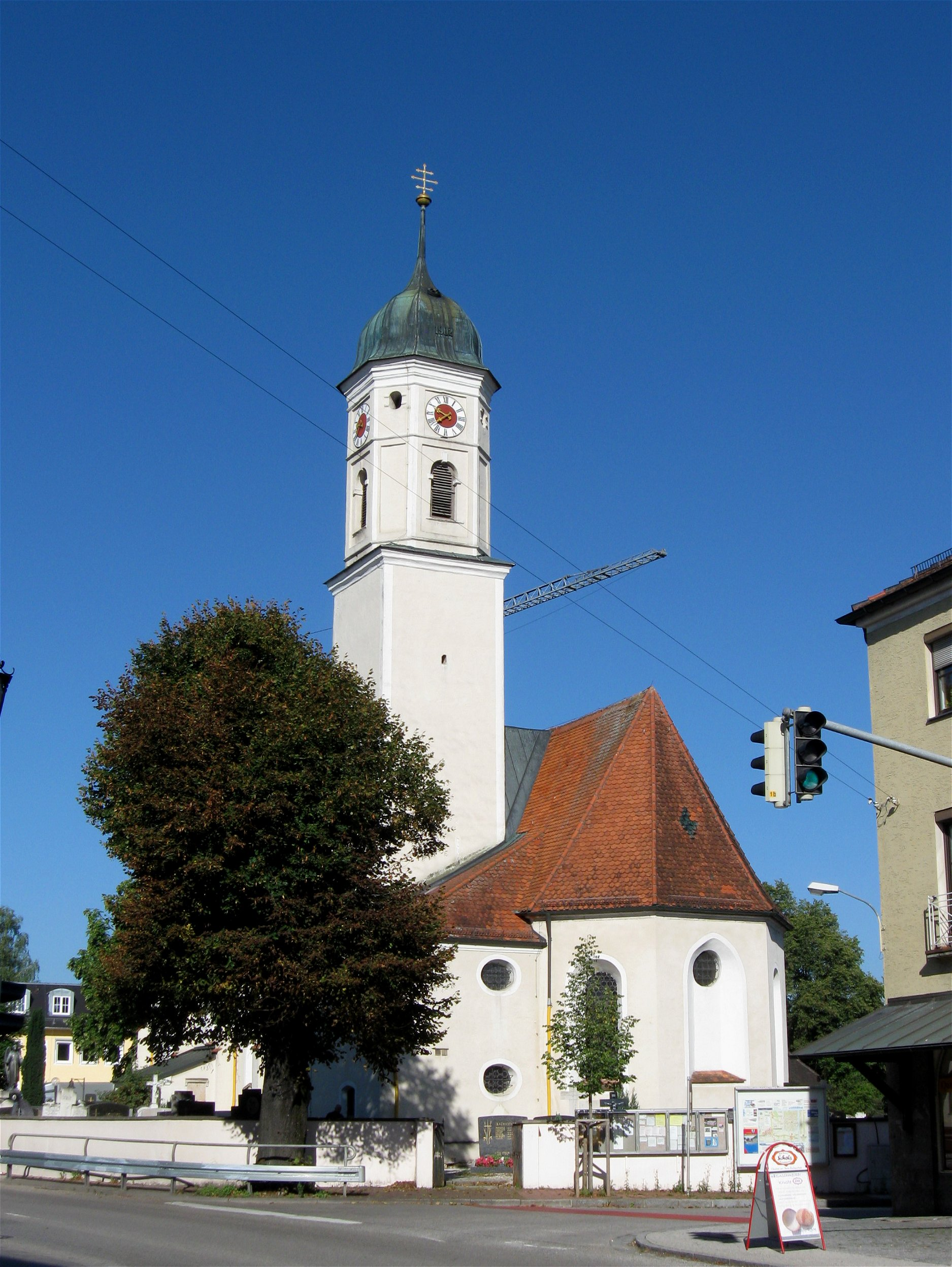 Münchener Straße 28. Kath. Pfarrkirche St. Gallus, spätgotischer Saalbau mit leicht eingezogenem Polygonalchor, angefügter zweigeschossiger Sakristei und südlichem Flankenturm, dendro.dat. 1473, barockisiert und Zwiebelhaube 1727 und dendro.dat. 1754, nach Westen verlängert 1849; mit Ausstattung.